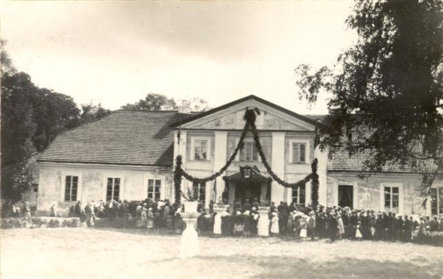 Antanavo dvaras apie 1938 m.